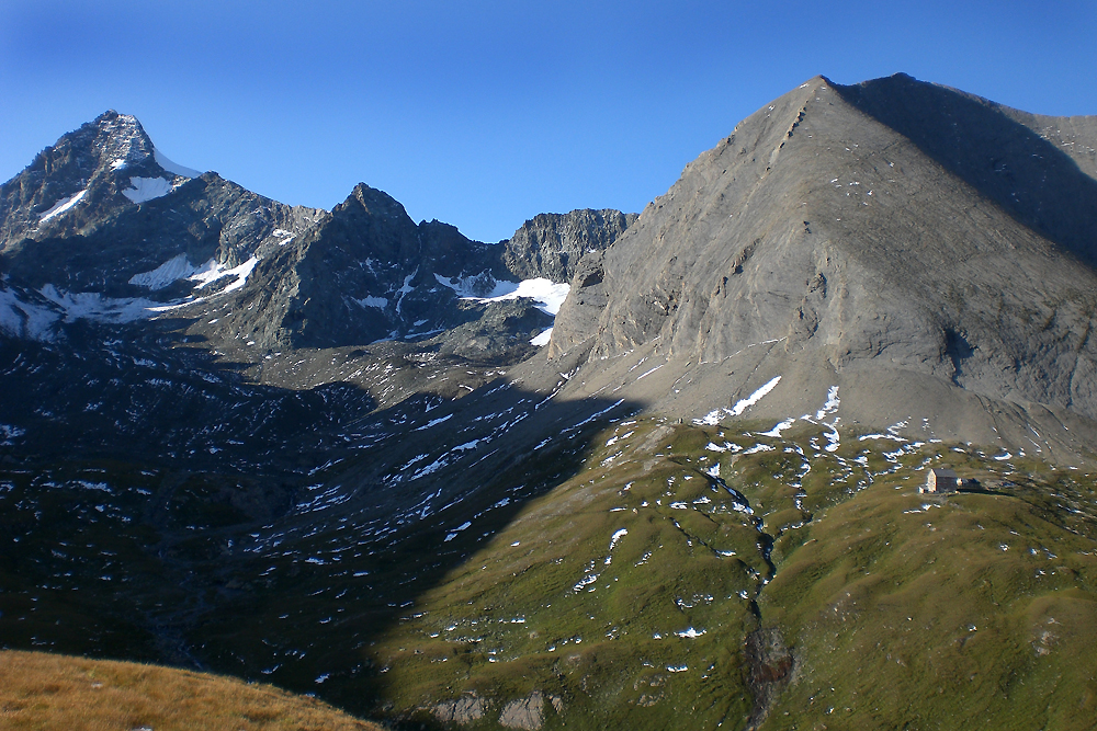 Blick über das Leitertal auf Großglockner und Adlersruhe Originalbeschreibung auf Flickr:Erstes Etappenziel vorbei an der Glorerhütte nach überwundenen 1000 Höhenmetern: Salmhütte Copyright: Gerhard Kaiser ( (